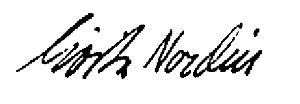 Arkitekt Gösta Nordins signatur